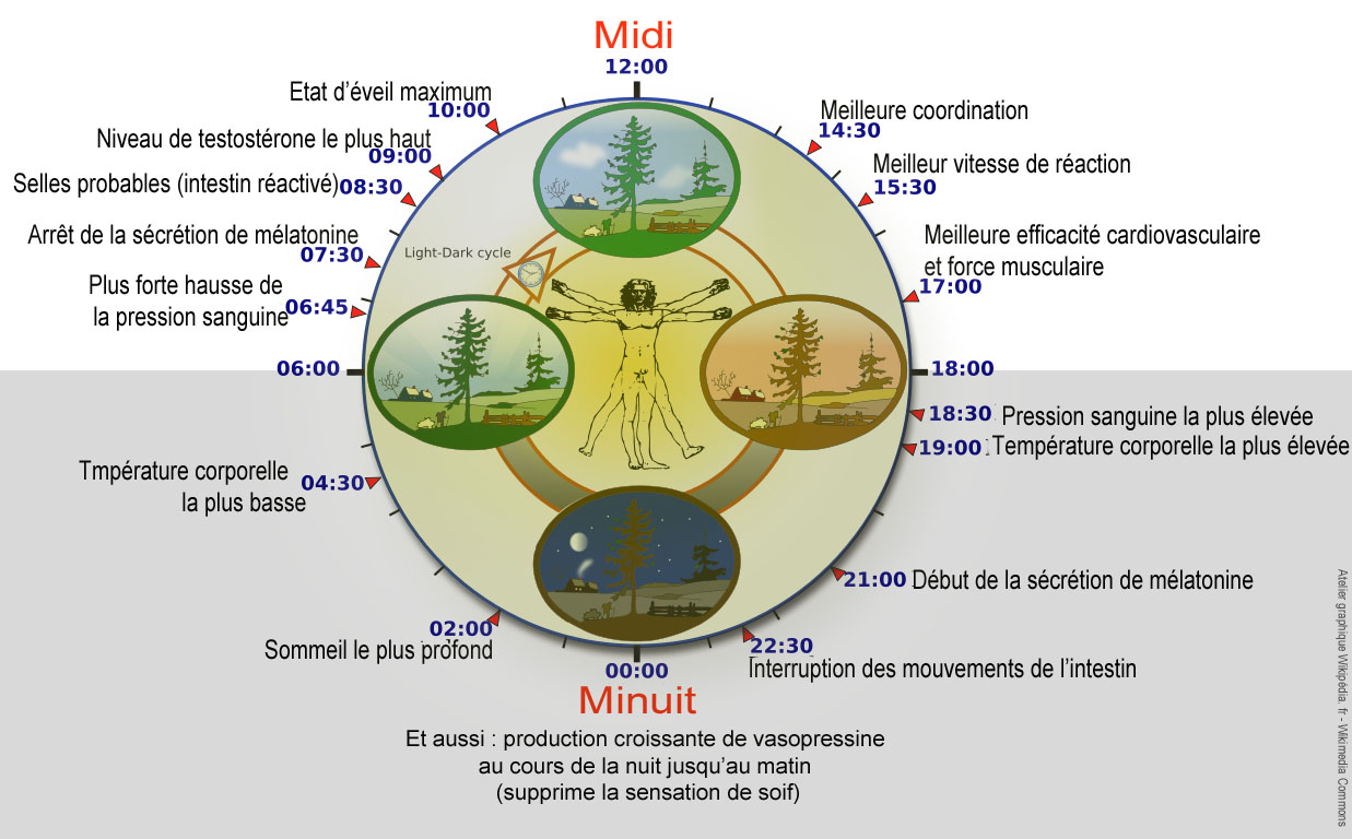 (d'après une autre image de Wikimédia commons : (GFDL). D'après un travail fait par YassineMrabet. sur la base de données extraites de "The Body Clock Guide to Better Health" by Michael Smolensky and Lynne Lamberg; Henry Holt and Company, Publishers (2000). vinettes paysages tirées de Open Clip Art Library (Ryan, Public domain). L'Homme de vitruve et l'horloge viennent de Image:P human body.svg (GNU licence) and Image:Nuvola apps clock.png, respectivement.